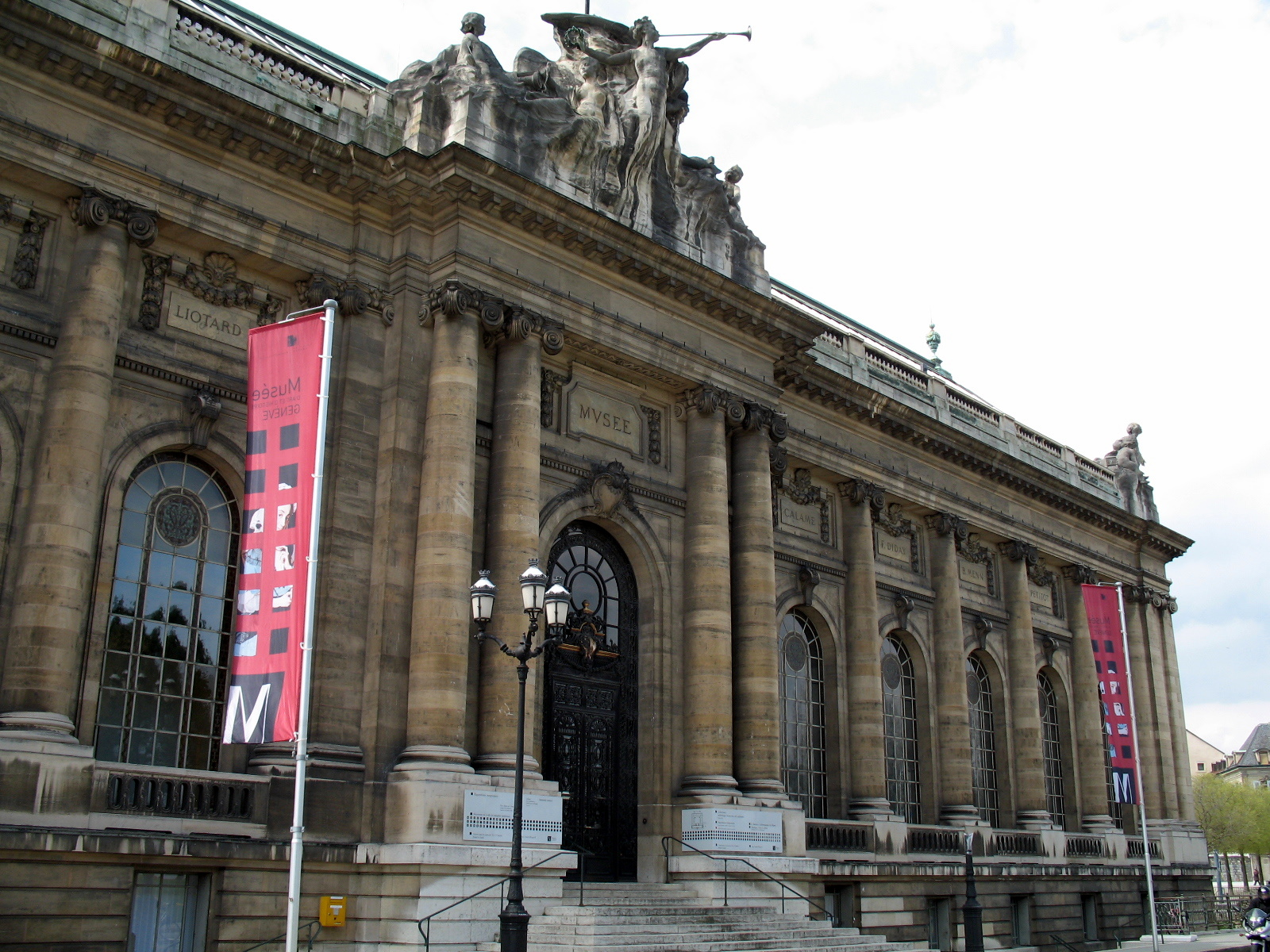 Façade du musée d'art et d'histoire à Genève